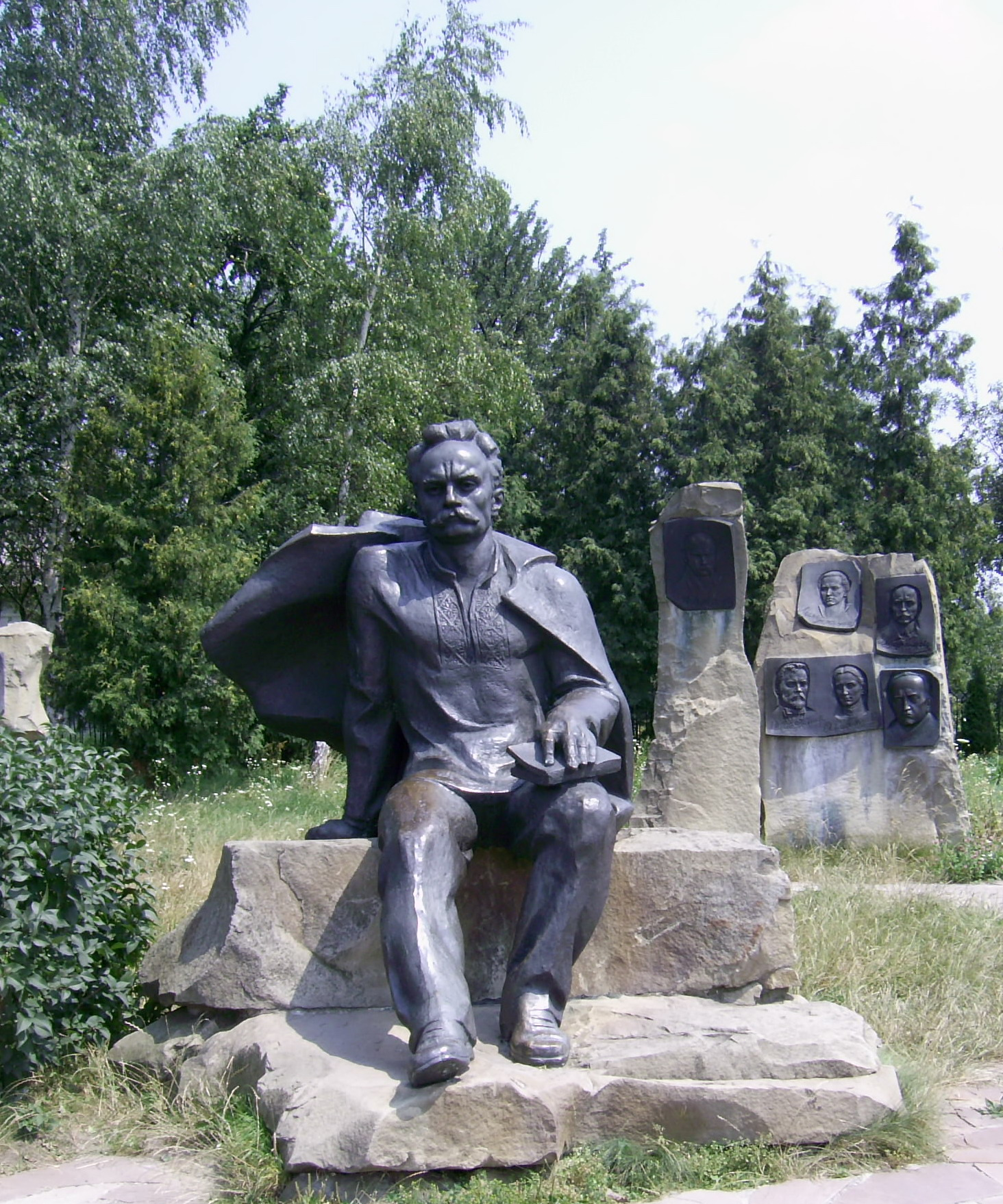 Дрогобицький район, с Нагуєвичі ,пам'ятник Франку І.Я., українському письменнику і вченому (ск. Є.Дзиндра, 1981, бронза)